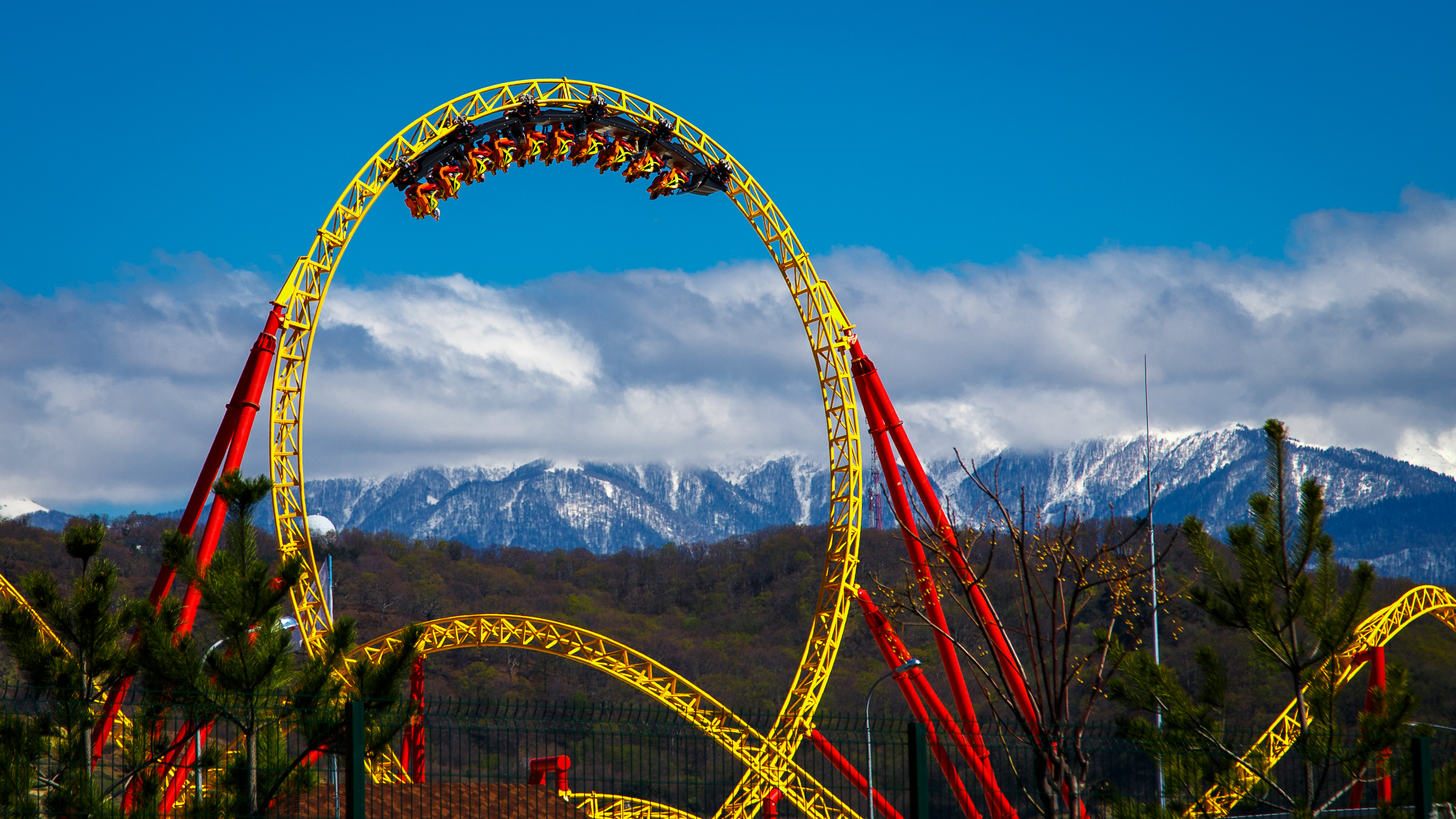 Змей Горыныч. Сочи Парк. Длина трассы аттракциона – 1056 метров, высота – 38 метров, скорость – до 100 км/ч.